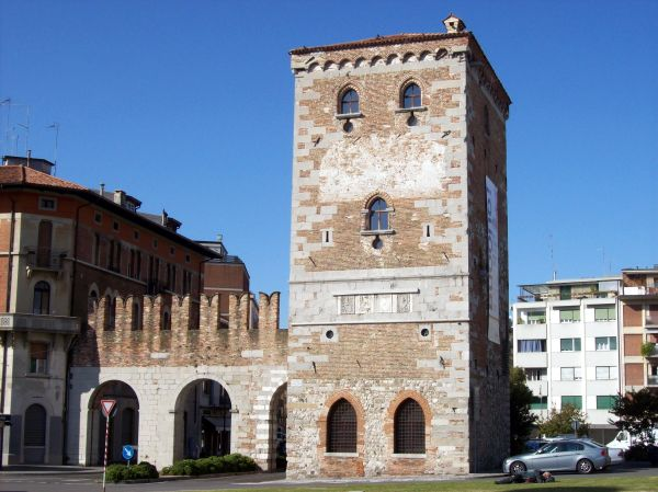 Udine (Friuli Venezia Giulia - Italy), Porta Aquileia (V cerchia muraria)